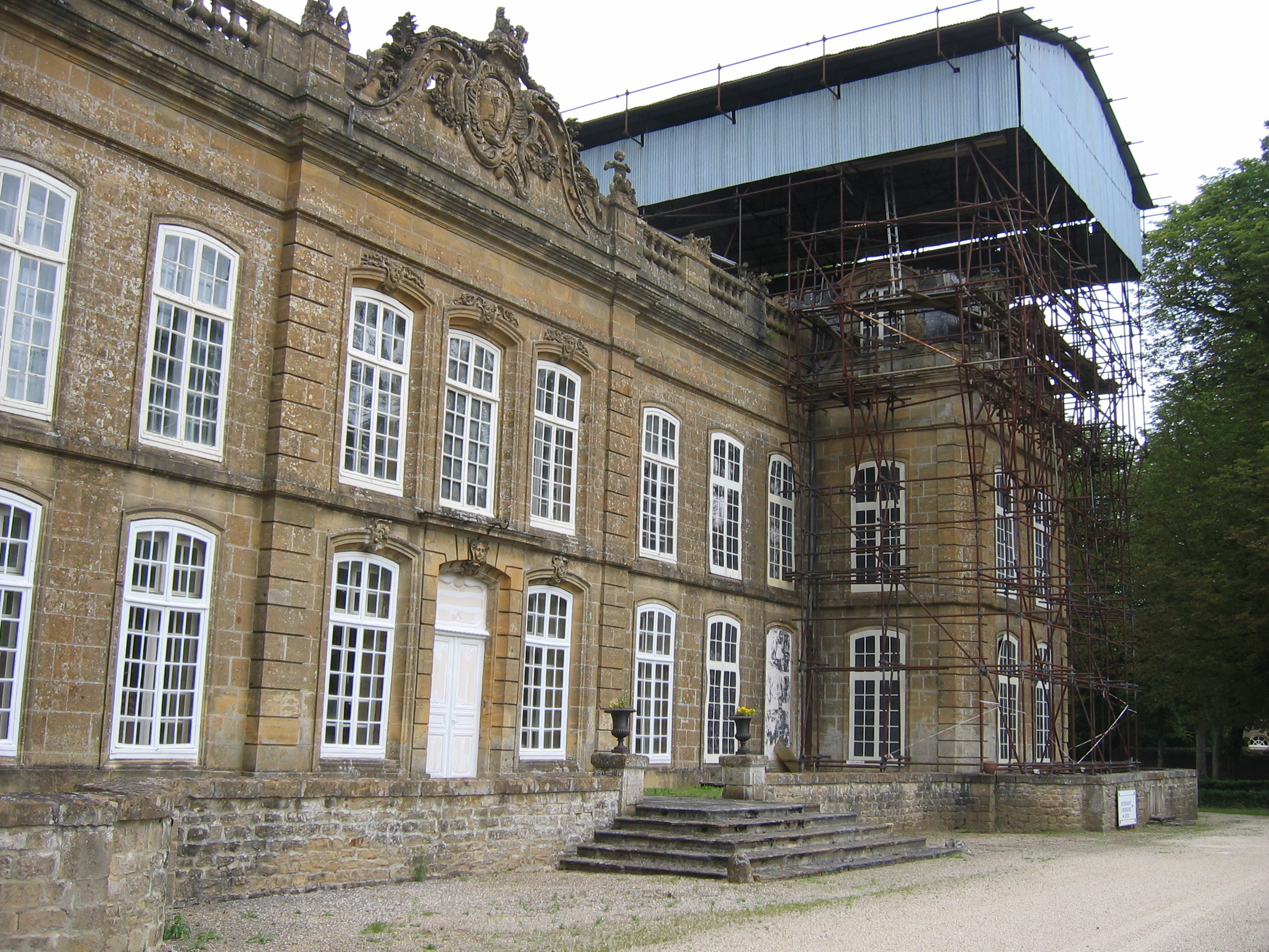 Château de Bazeilles, Bazeilles, Ardennes (France)